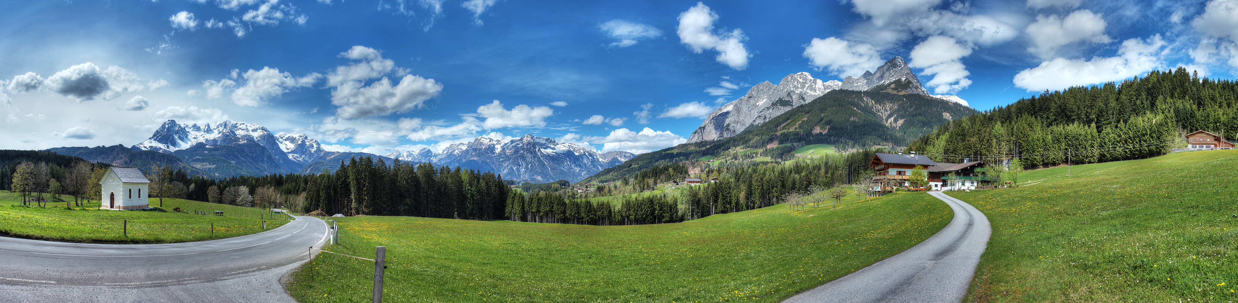 Dietlkapelle Panorama 22-04-2014